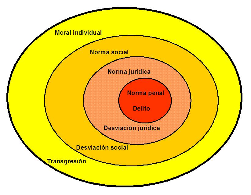 Digrama que muestra la relación entre los diferentes tipos de normas, y las sanciones por su incumplimiento (simplificado)